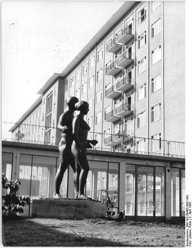 Gera, Krankenhaus Zentralbild Liebers Zum Weltgesundheitstag am 7. April: Ein modernes Bergarbeiterkrankenhaus entstand in den letzten Jahren in Gera. Es wurde mit einem Kostenaufwand von 30 Millionen MDN errichtet und im Dezember vorigen Jahres seiner Bestimmung übergeben. Das Bergarbeiterkrankenhaus in Gera ist das Gesundheitszentrum für den medizinischen Versorgungsbereich des ostthüringischen Raumes und verfügt über 600 Betten, die zu einem Drittel auch für nicht im Bergbau Beschäftigte zur Verfügung stehen. 650 Mitarbeiter, darunter 40 Ärzte und 200 Schwestern, sorgen für eine gute Betreuung der Patienten. Hier eine Außenansicht des Klinikums.